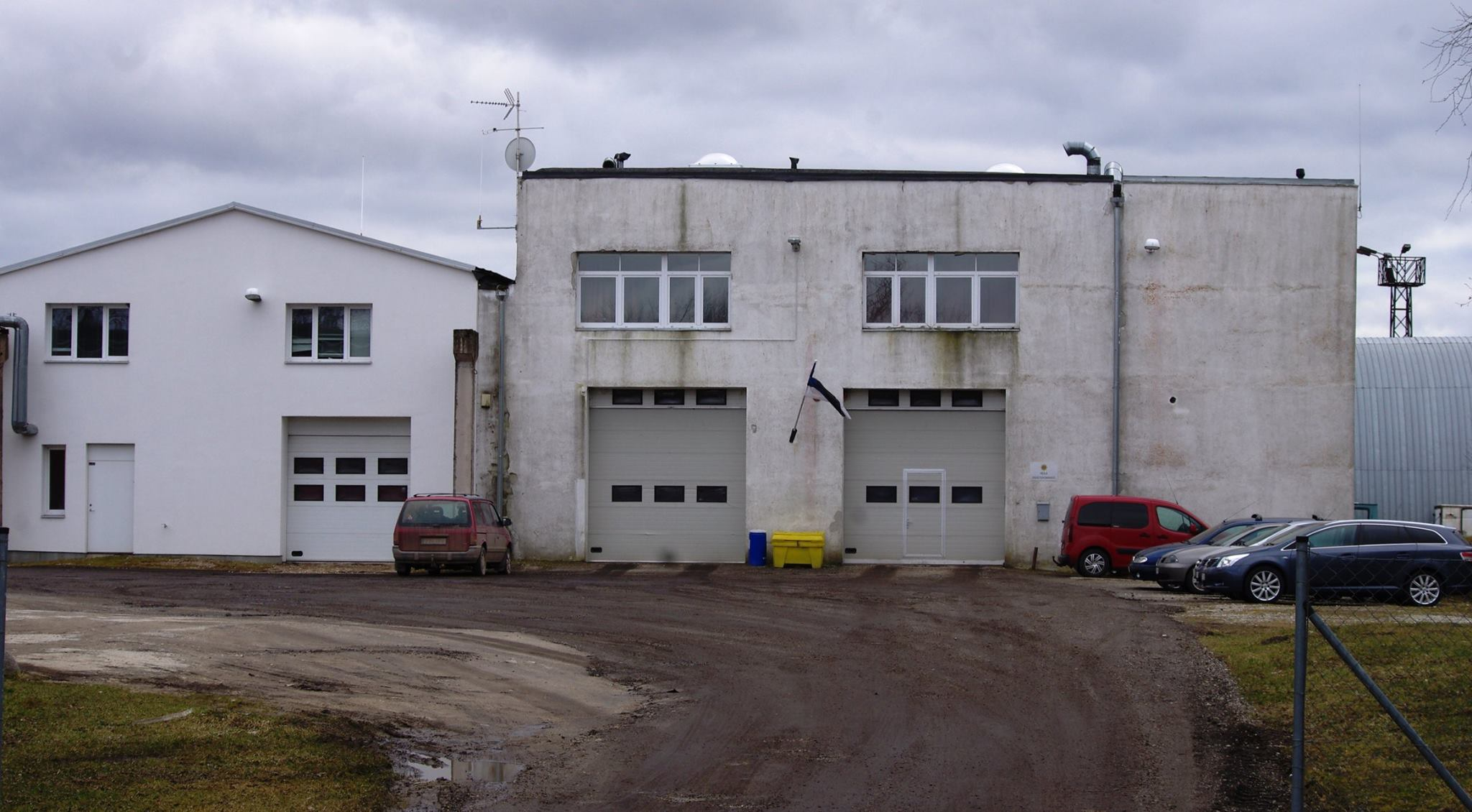 Keila päästeameti depoo